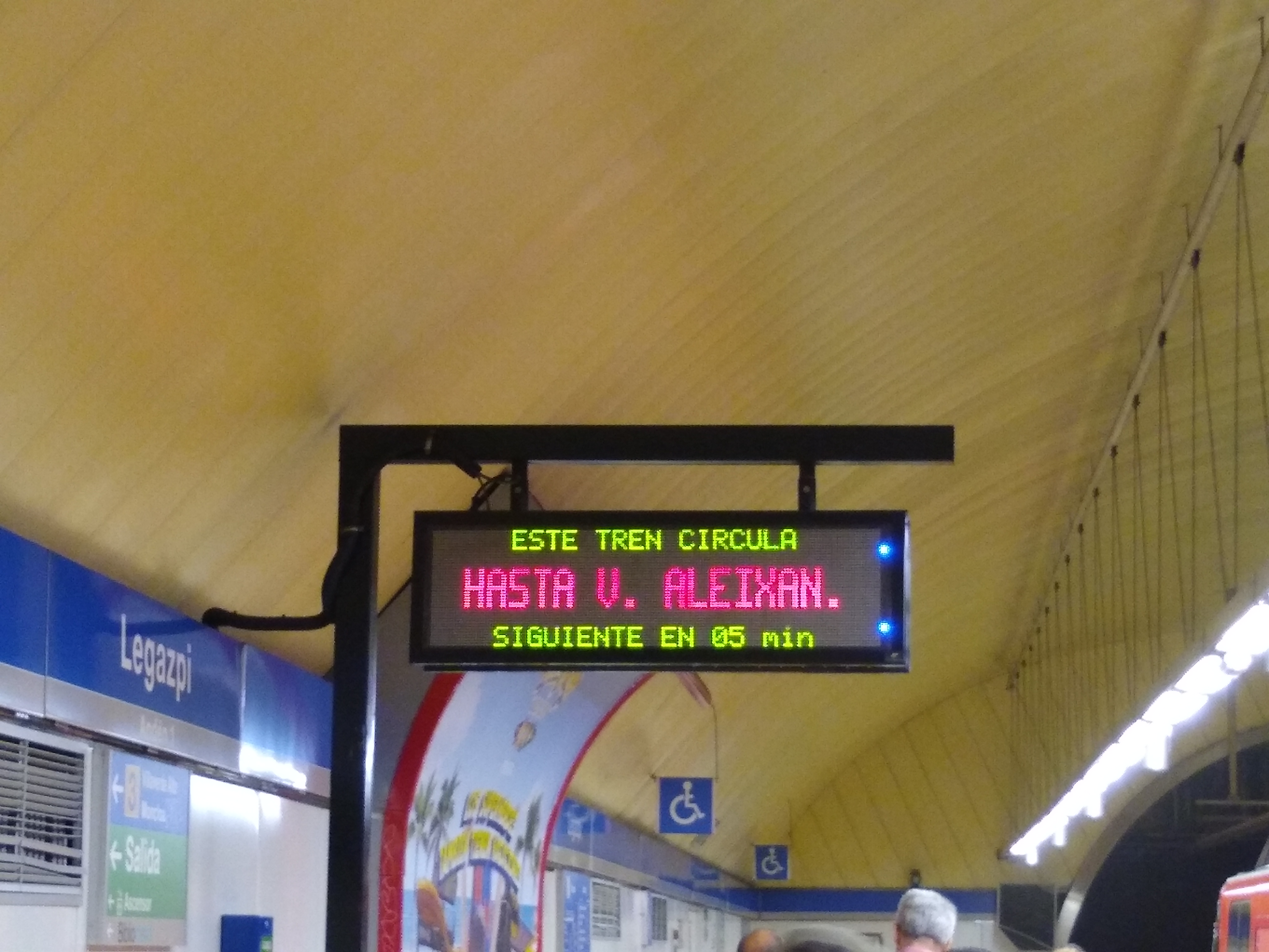 Teleindicador en Moncloa (L6, Metro de Madrid)